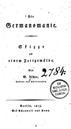 Saul Ascher Germanomanie Titelblatt